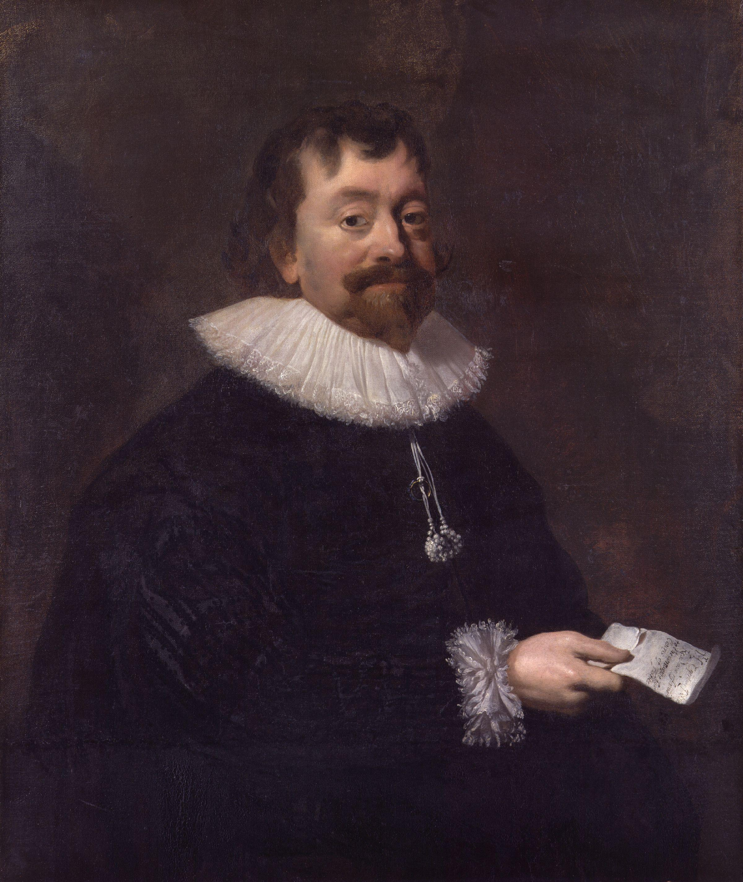 Sir Robert Phelips